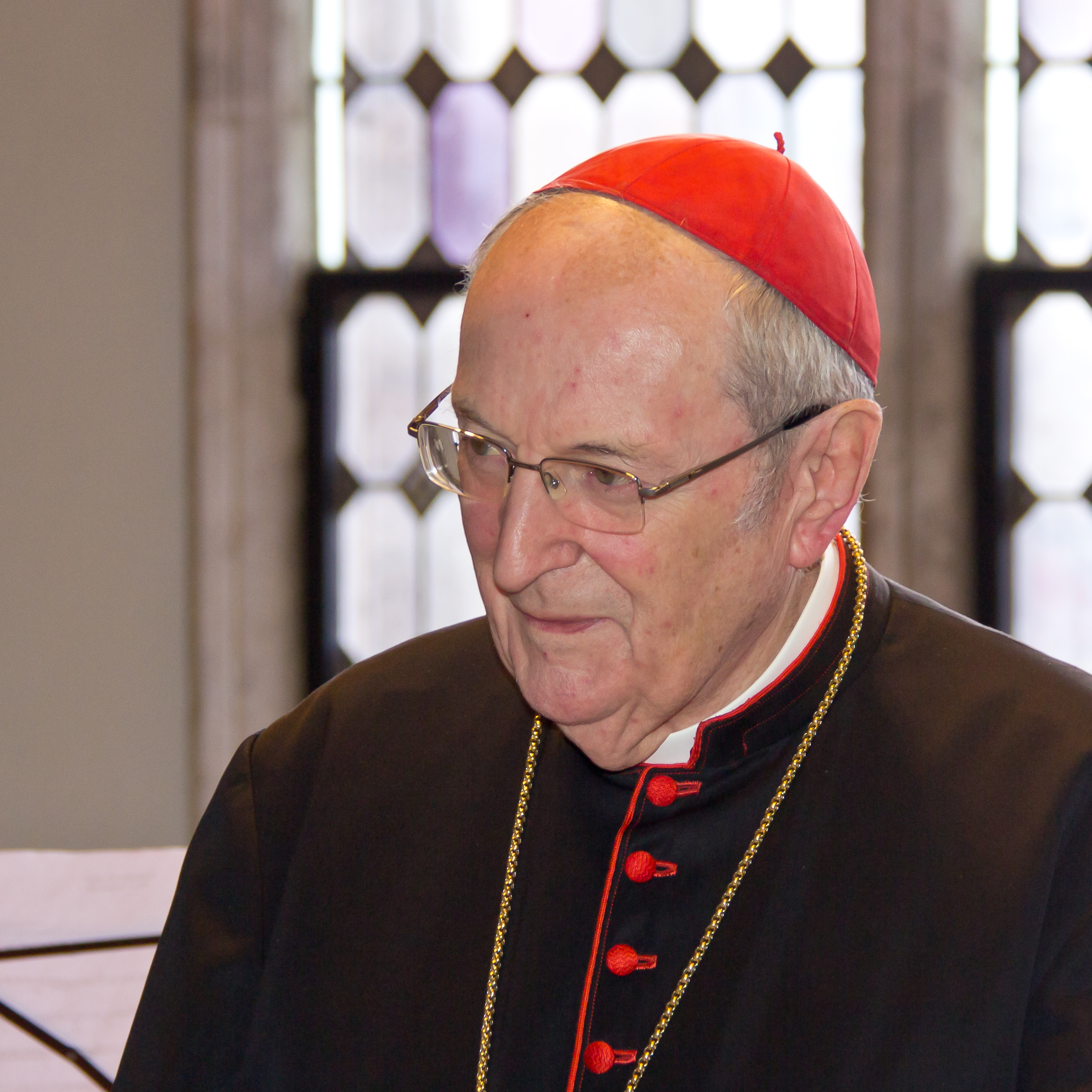 Empfang für Joachim Kardinal Meisner zum Abschied aus dem Amt nach 25 Jahren durch Köln Oberbürgermeister Jürgen Roters im Hansasaal des Historischen RathausesFoto: Kardinal Meisner